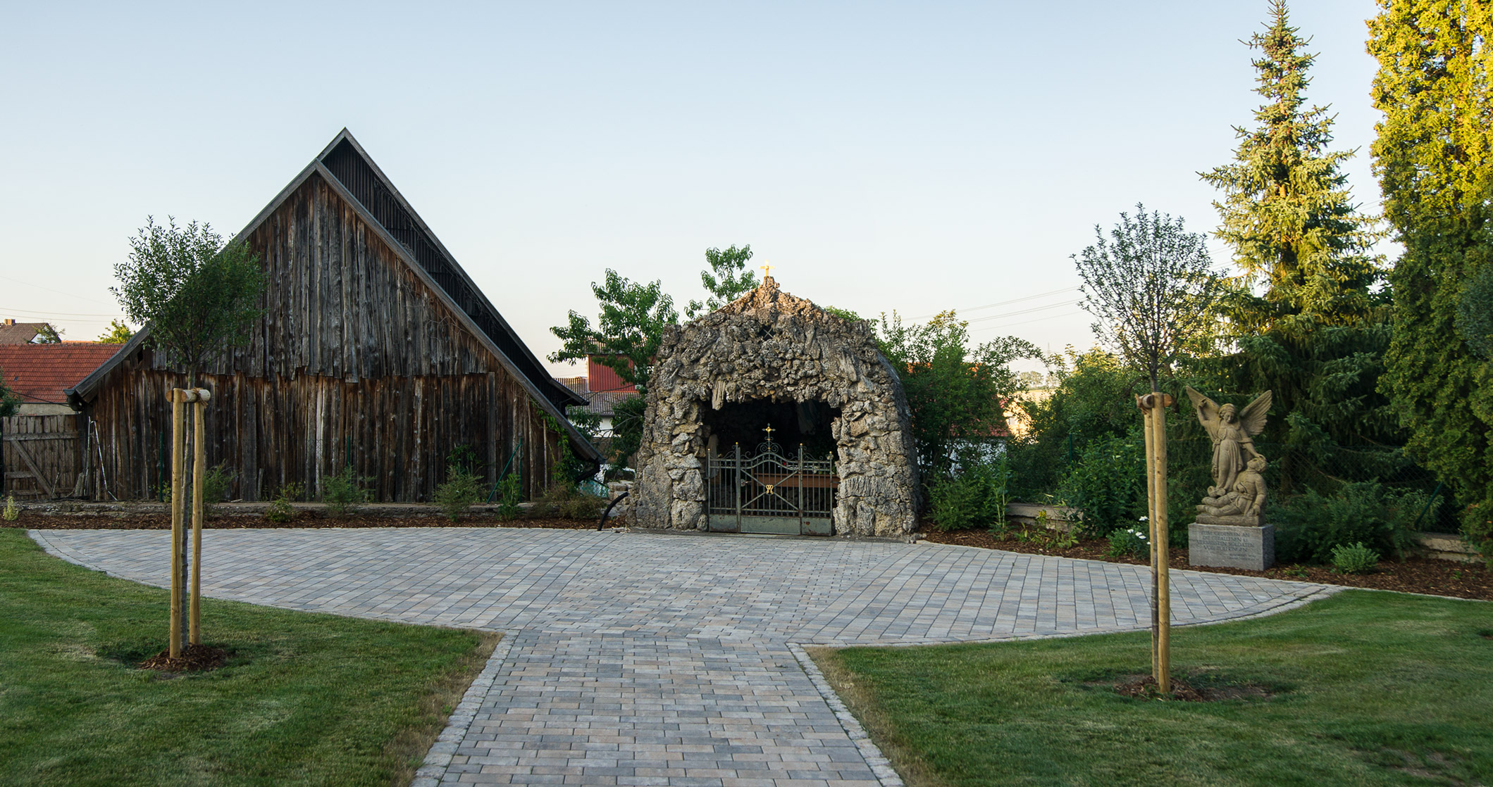 Mariengrotte und Kriegerdenkmal auf der Ostseite von St. Kilian